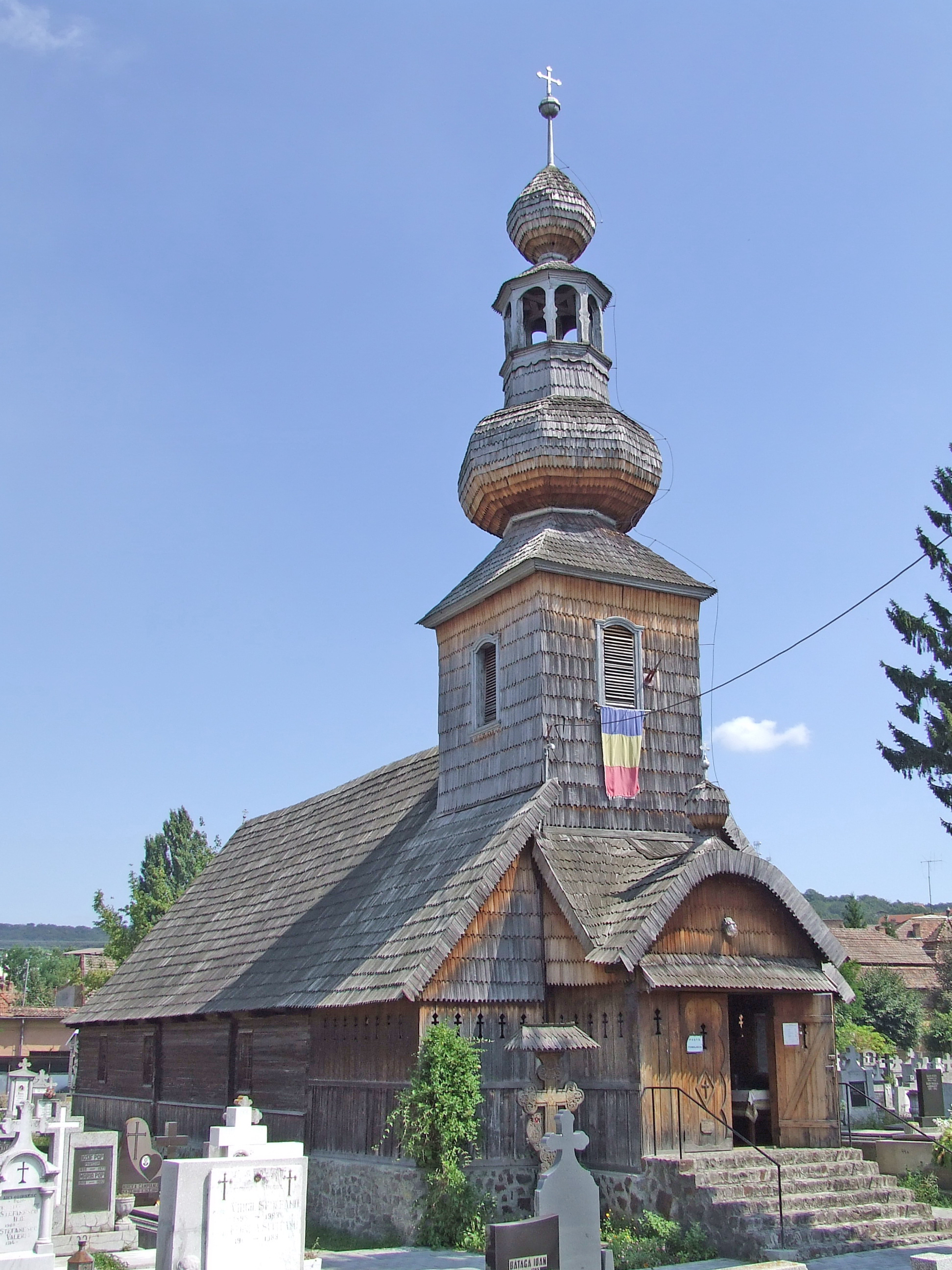 Biserica de lemn din Târgu Mureş, judeţul Mureş.